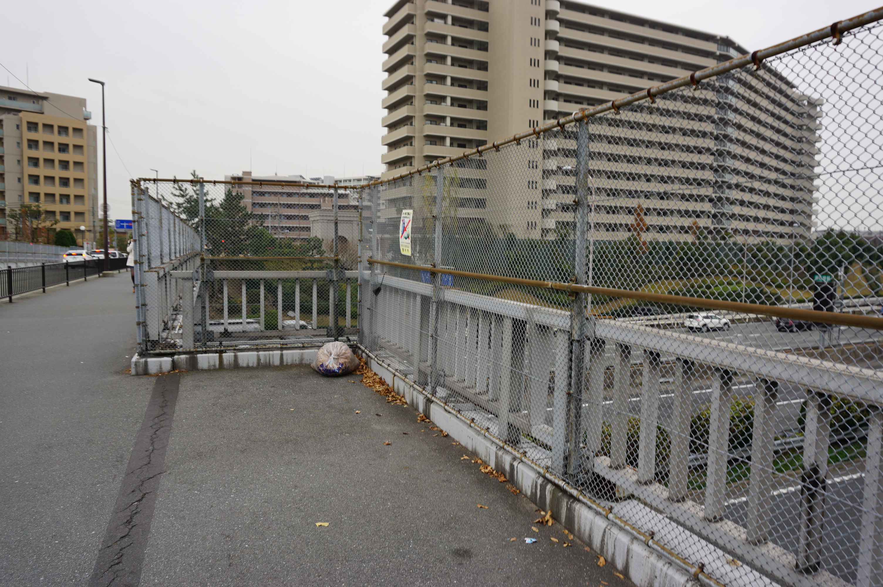 北新田橋に残る千里中央仮駅があった痕跡